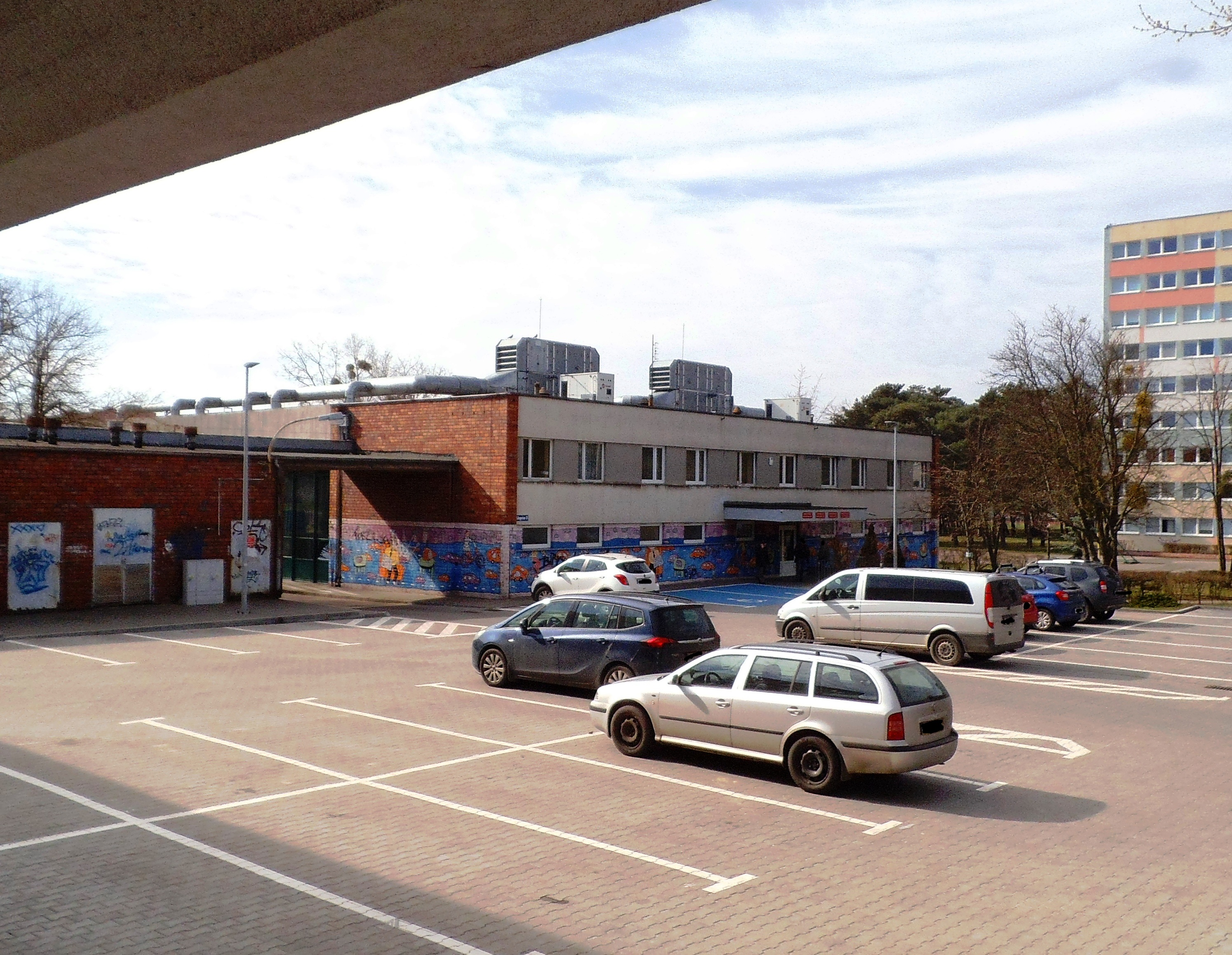 Sale gimnastyczne UMK Toruń